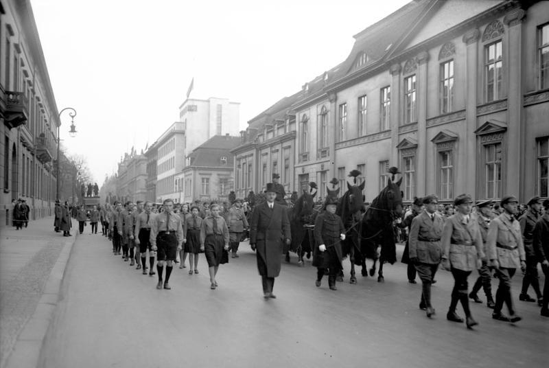 Die feierliche Beisetzung des Reichskanzlers a.D. Herrmann Müller! fand unter grosser Beteiligung der Reichsbehörden und des Reichsbanners in Berlin statt. Der feierliche Trauerzug bewegt sich durch die Wilhelmstrasse in Berlin, flankiert von Mitgliedern des Reichsbanners. Im Hintergrund das Reichskanzlerpalais.